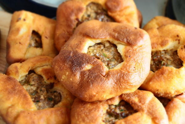 Беляши